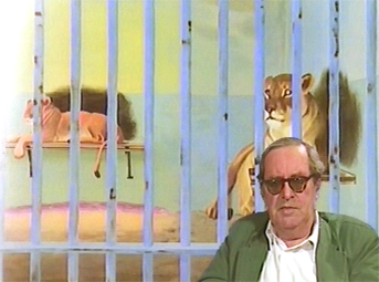 Portrait de Gilles Aillaud